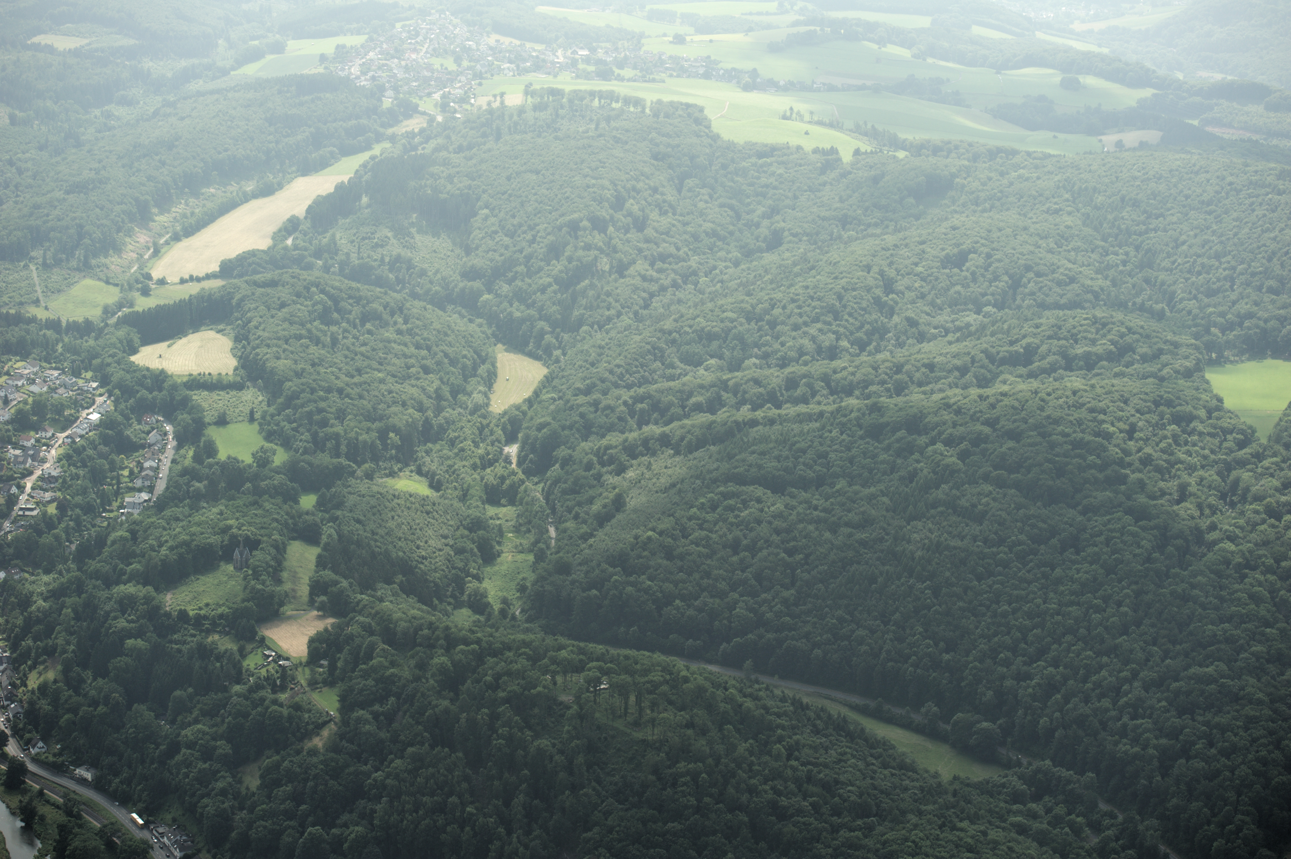 Fotoflug Sauerland-Ost - Arnsberg Blick nach Westen u.a. mit Seltersberg, Eisenberg und Römberg mit Kreuzkapelle und Rüdenburg sowie Blick ins Seufzertal mit Wennigloh im Hintergrund; Wald teilweise im NSG Waldreservat Obereimer